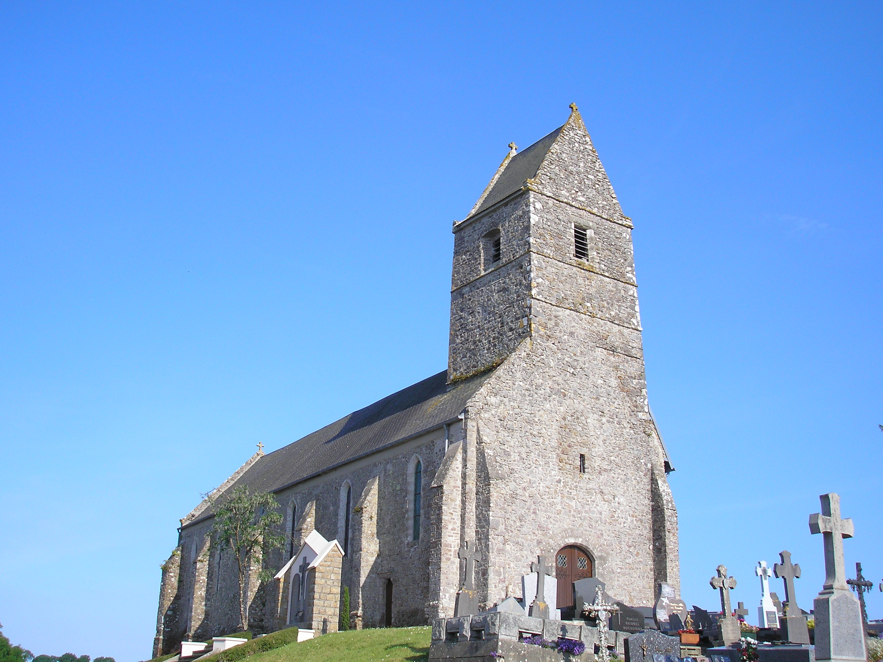 Hyenville (Normandie, France). L'église Saint-Jean-Baptiste.